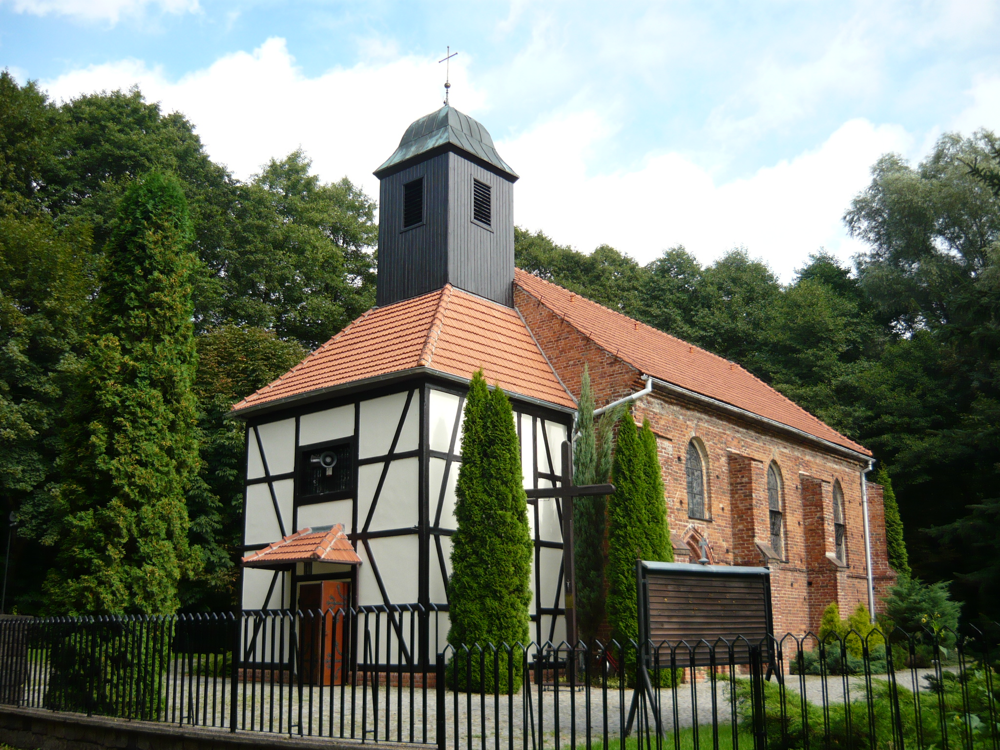 Kościół Podwyższenia Krzyża Świętego w Kaszczorku, woj. kujawsko-pomorskie.